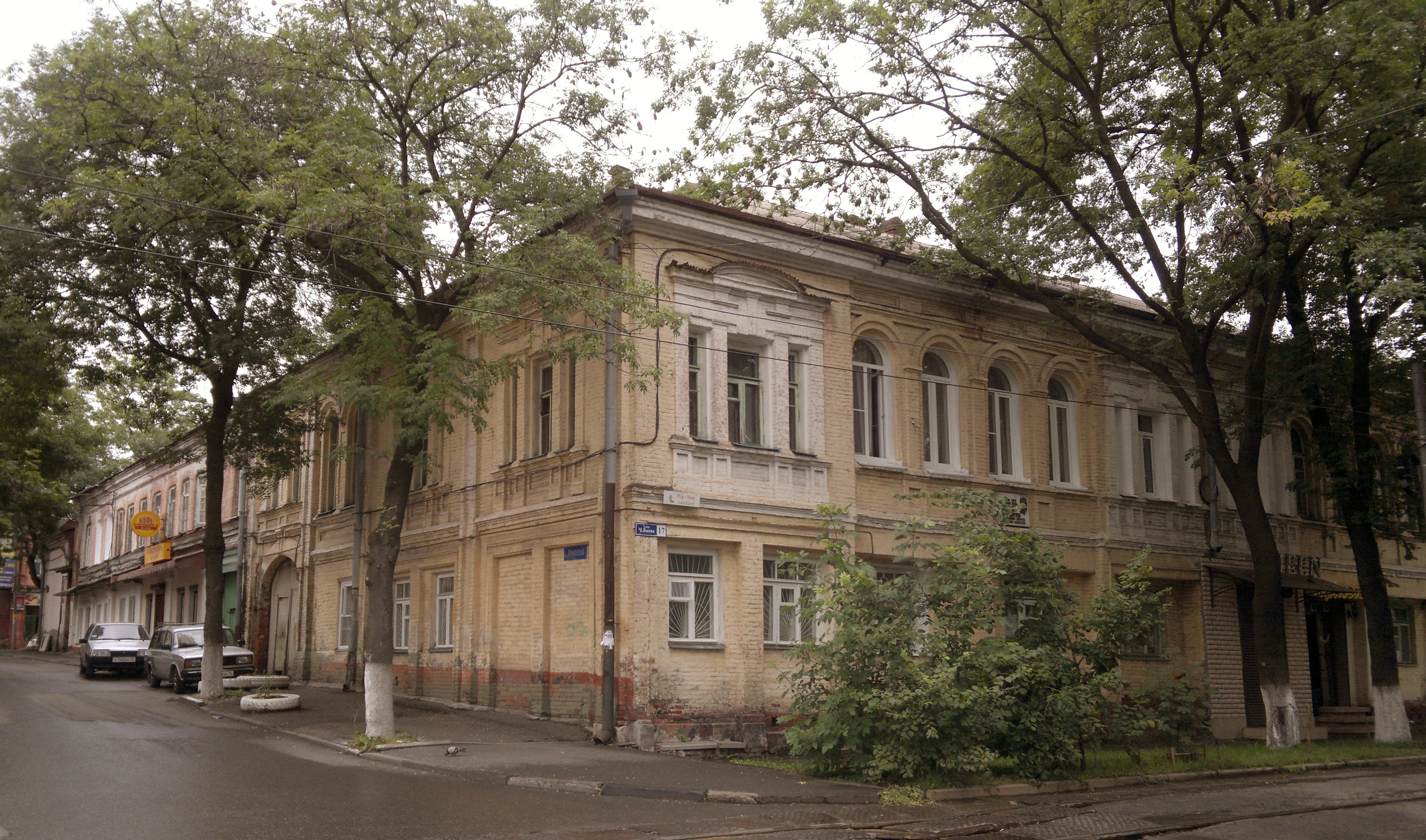 Дом, где родился и вырос Е. Б. Вахтангов. Владикавказ, улица Армянская